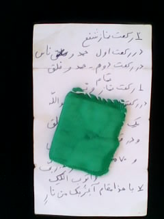 امور اعتقادی غلط متافیزیک